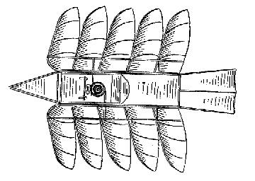 Чертёж из патента на летательный аппарат